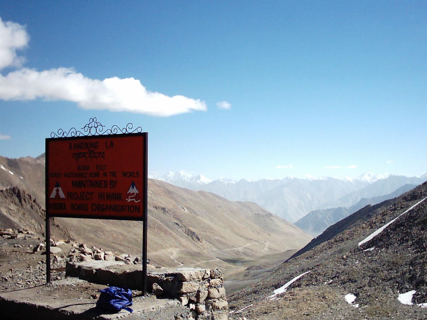 Kardong La - Blick aufs Karakorum